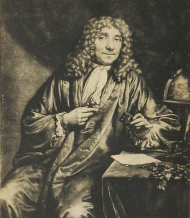 Antoni van Leeuwenhoek